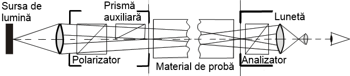 Polarimeter